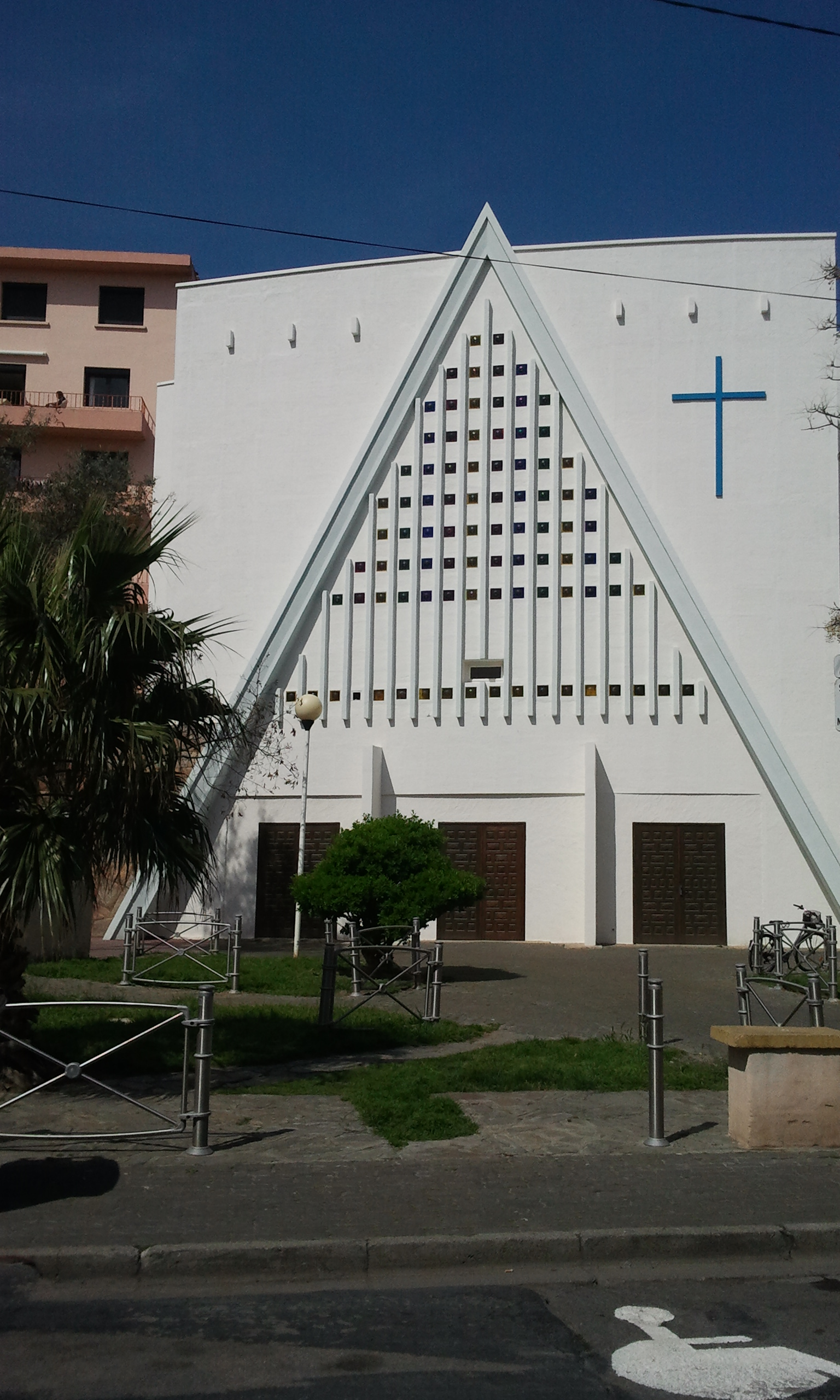 L'église Notre-Dame-des-Flots à Canet-en-Roussillon